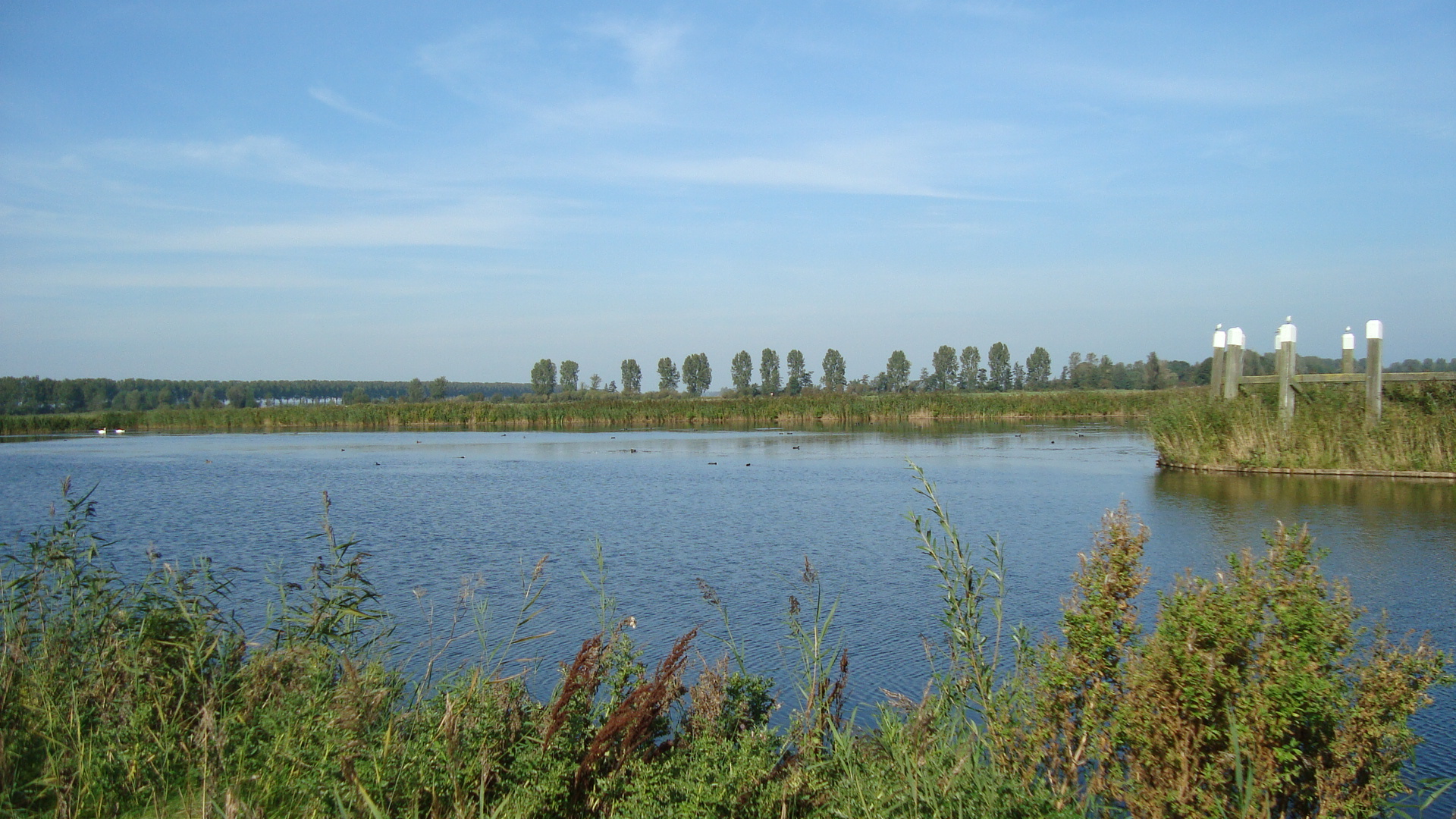 Foto genomen van het westelijk havenhoofd. In het midden het water om de havenhoofden heen. Rechts op de foto het noordelijk havenhoofd.